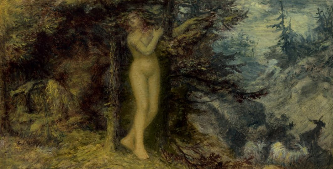 Metamorfosis de Pitis en pino, ante Pan